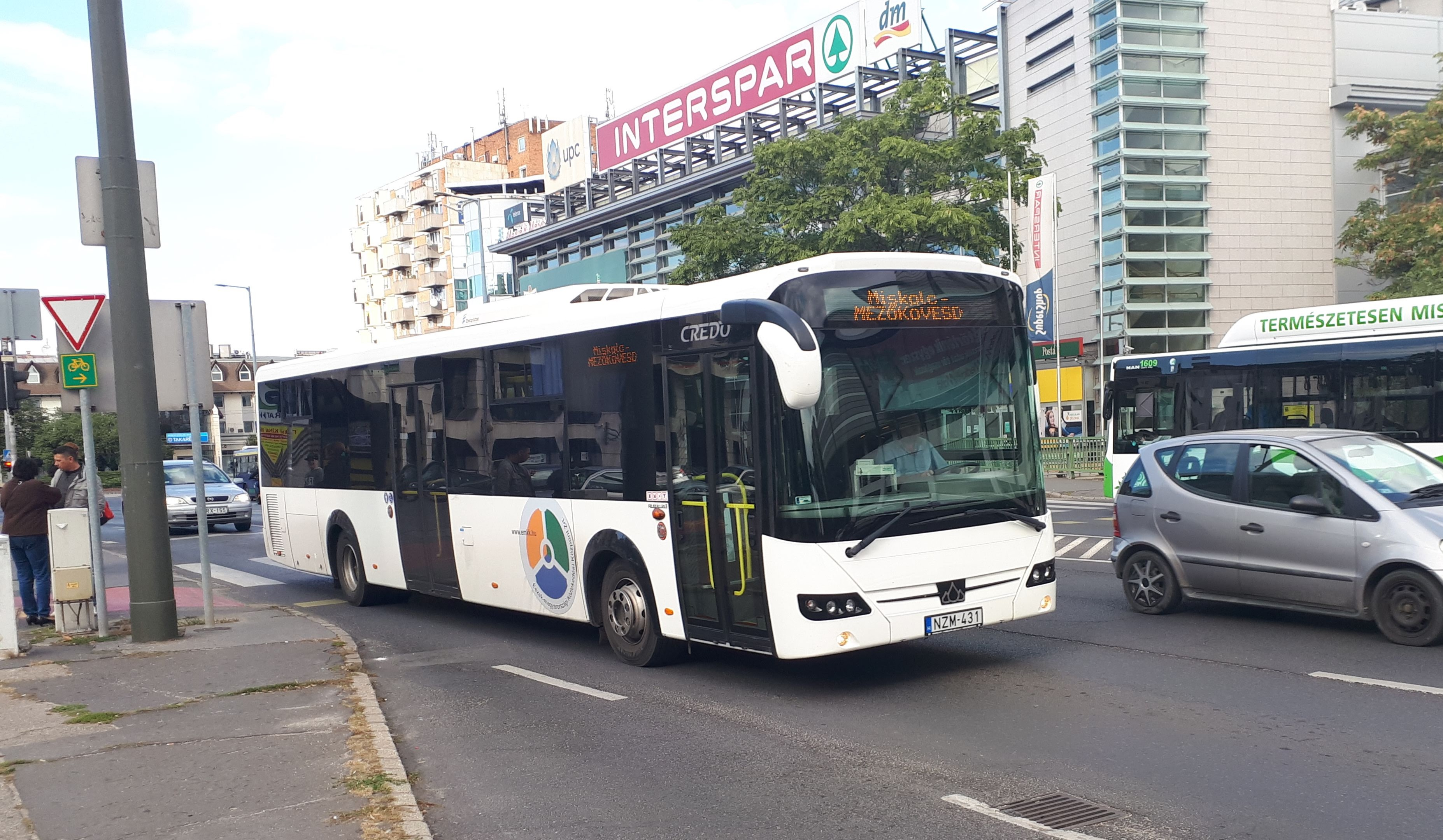 Az ÉMKK NZM-431 rendszámú Credo Econell 12 típusú busza Miskolcon, a 3749-es helyközi járaton.